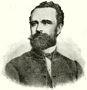 Hollán Ernő (1824–1900) honvédtiszt, hadmérnök, politikus, országgyűlési képviselő, a Magyar Tudományos Akadémia tagja. Marastoni József rajza